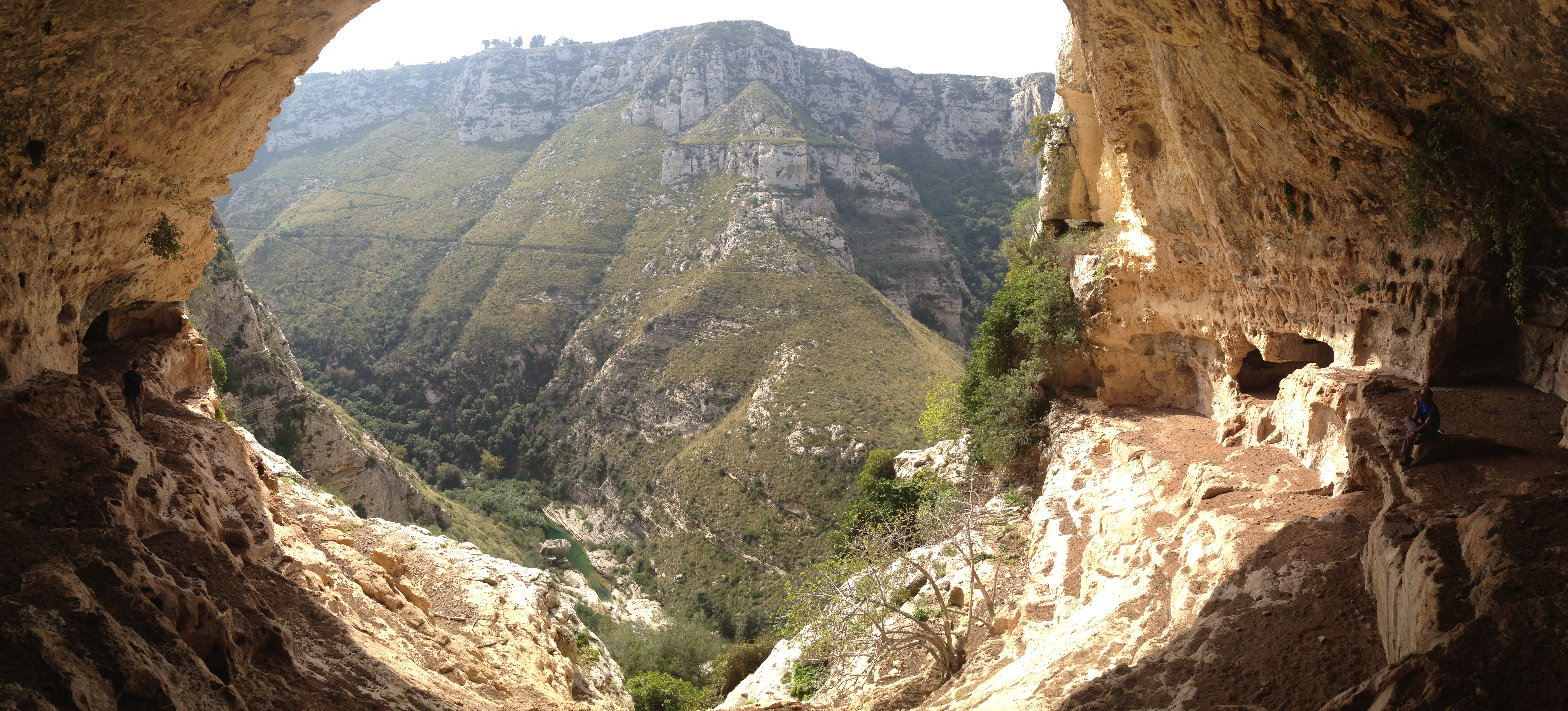 Panorama dalla grotta